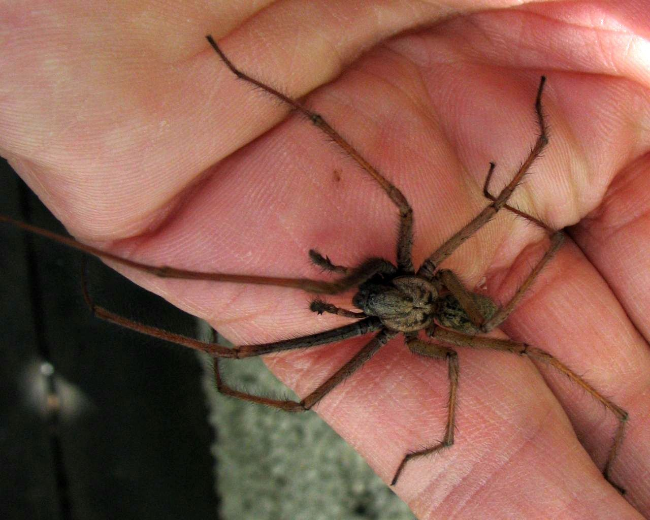 En voksen hann av stor husedderkopp Tegenaria atrica. Jevnt lyse ben skiller den fra T. domestica. Template:Byline